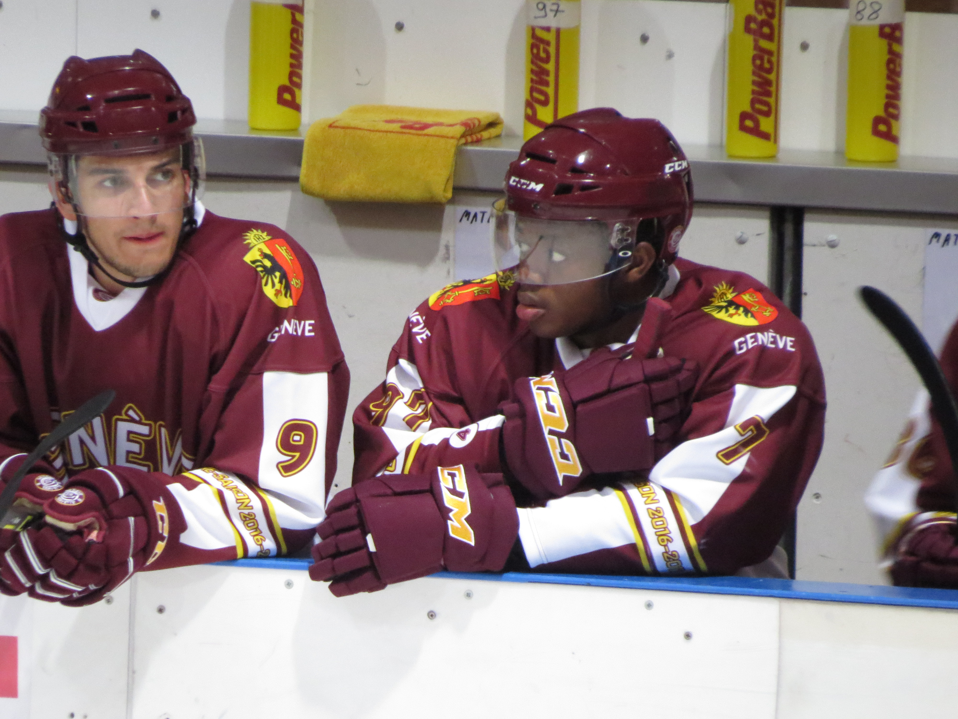 GSHC - Redbull Munich 97 : Auguste Impose